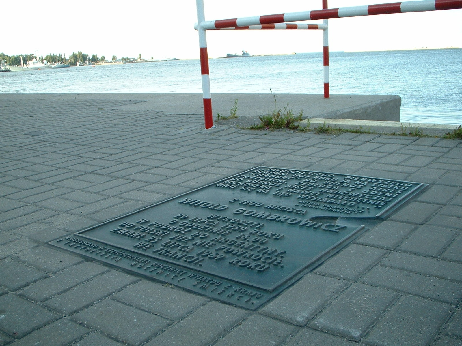 Tablica w porcie w Gdyni upamiętniająca opuszczenie przez pisarza Polski